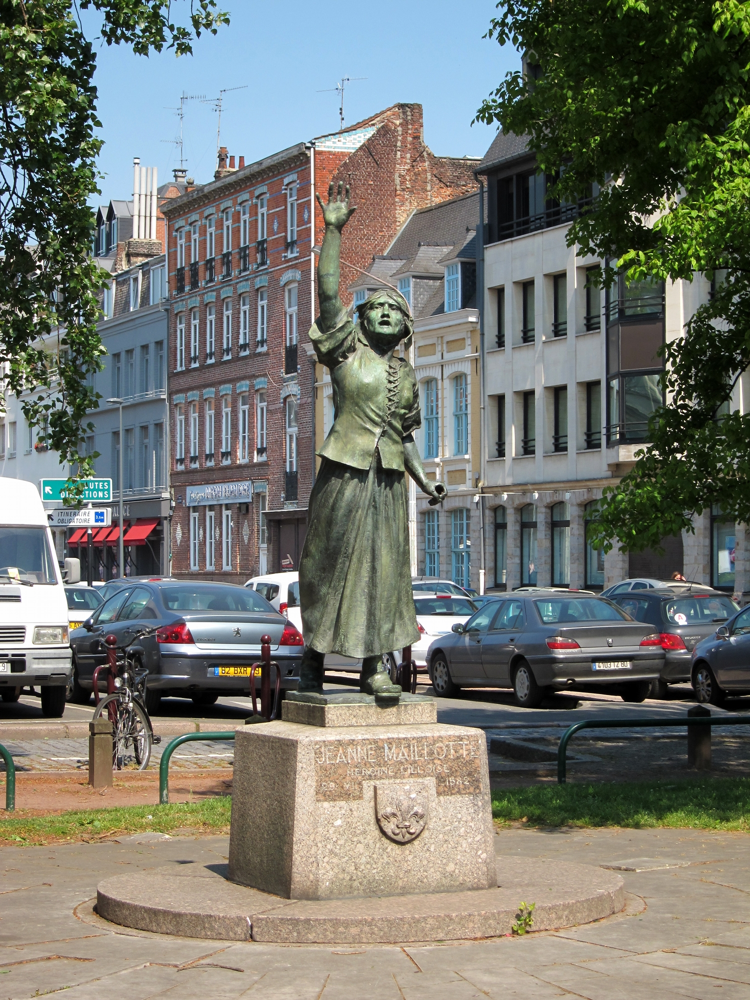 La statue de Jeanne Maillotte, rue du Peuple Belge à Lille (Nord).